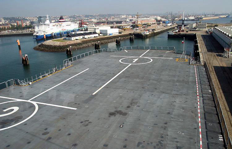 Le pont d'envol du Bâtiment de Projection et de Commandement (BPC) Mistral dans le port de sa future ville marraine Le Havre (4 octobre 2007).